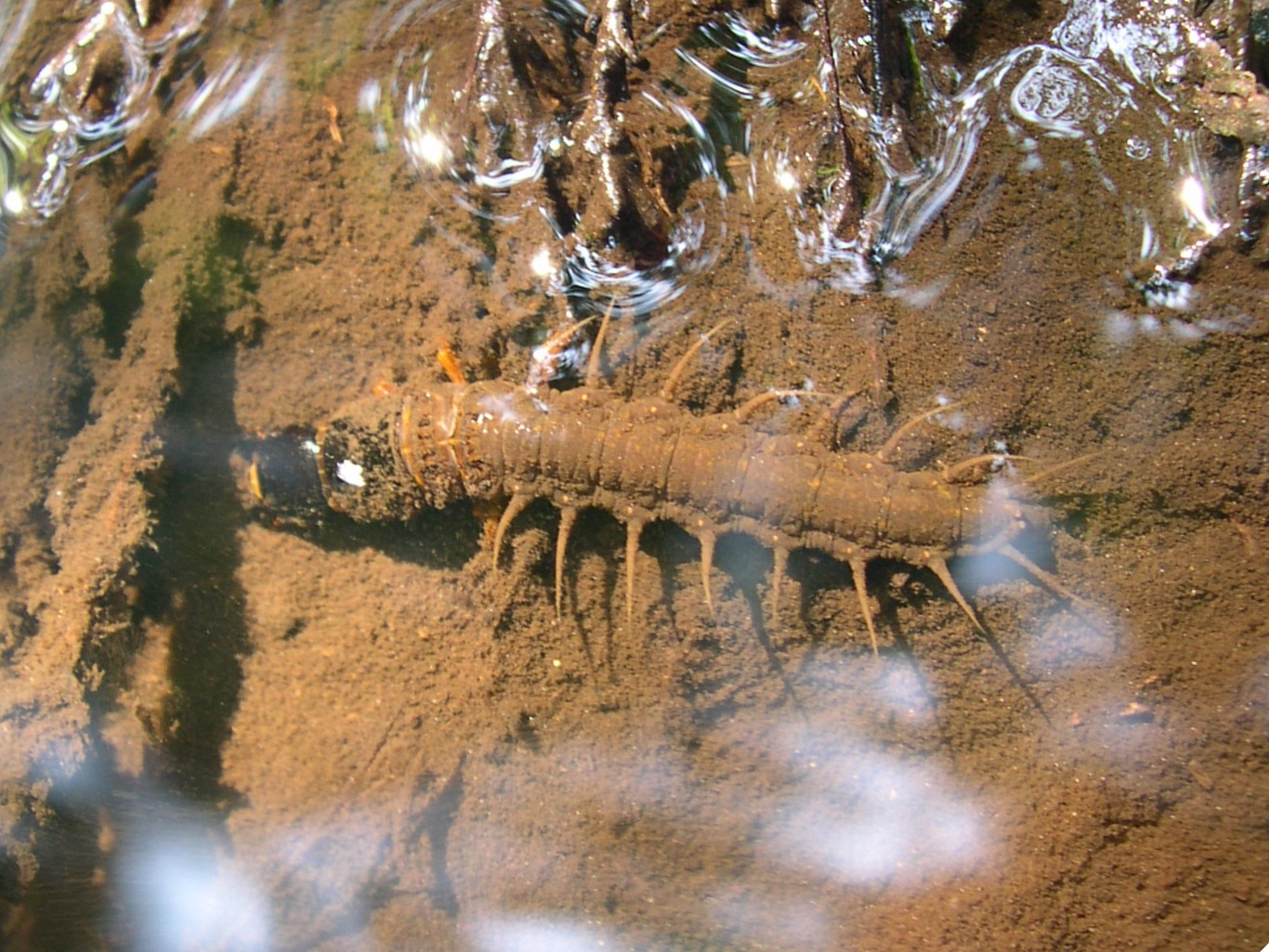 ヤマトクロスジヘビトンボ Parachauliodes japonicus (McLachlan, 1867) の幼虫（小川底）。 神奈川県横浜市（Yokohama, Kanagawa pref., Japan.）